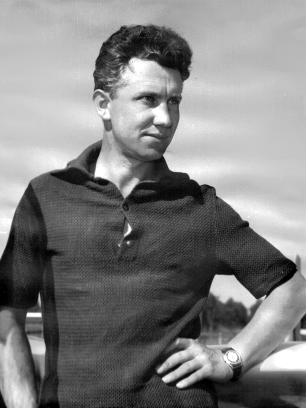 Edward Makula, de Polonia, campeón de la clase libre del Campeonato Mundial de Vuelo a Vela de 1963, realizado en Junín, Argentina.